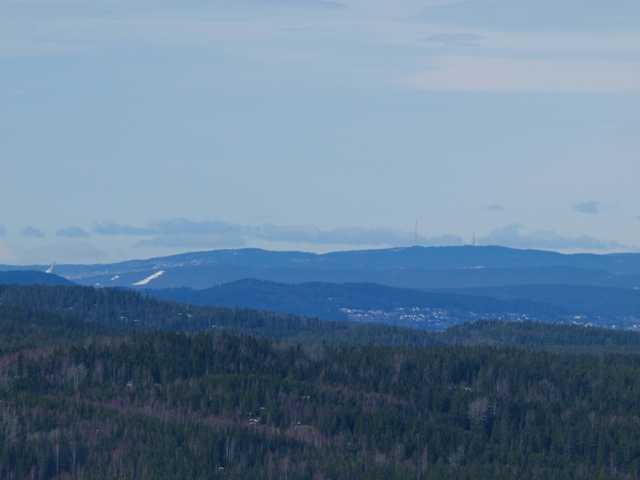 Holmenkollen og Tryvannstårnet fra Elgheiatårnet